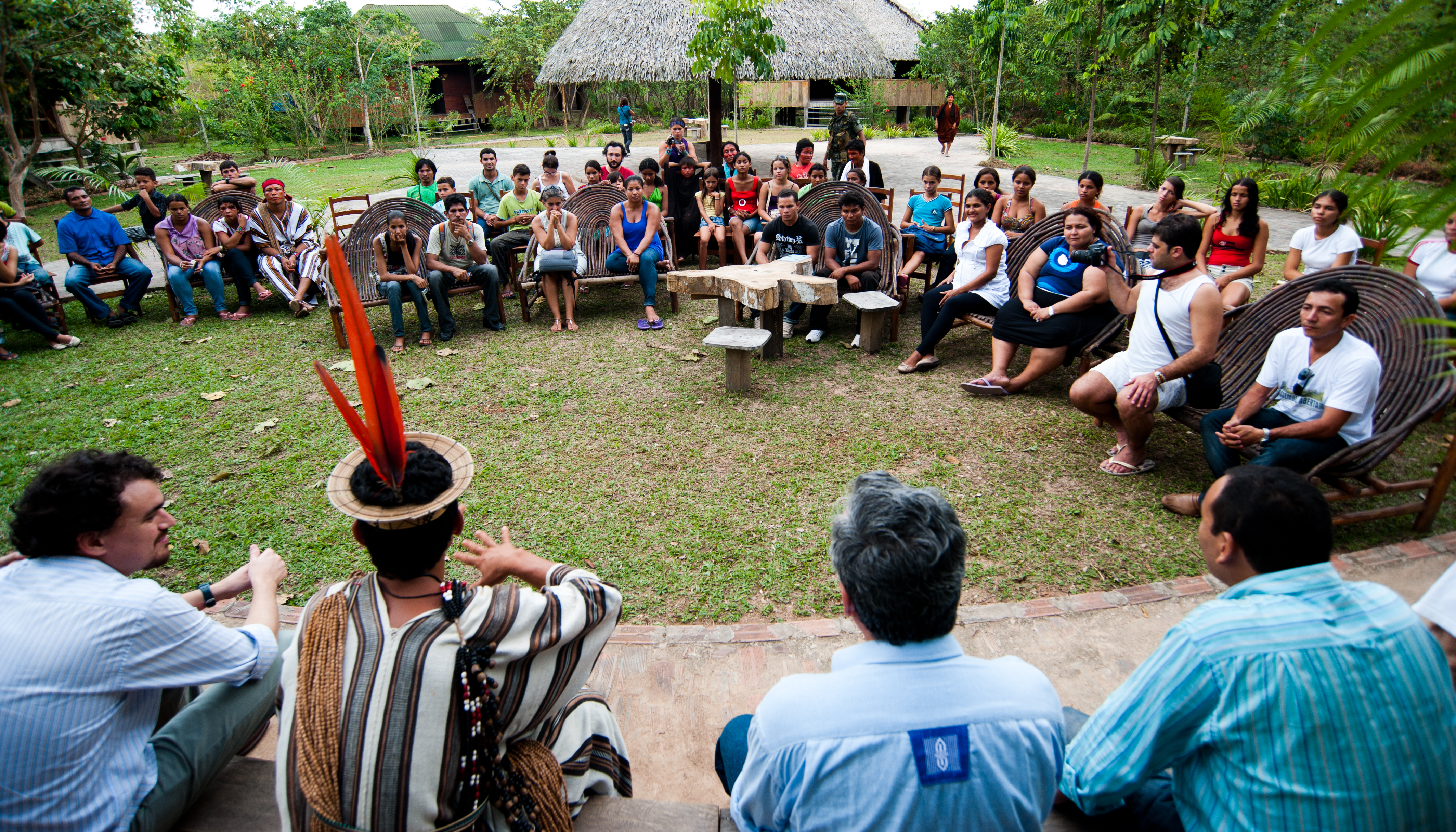 Ministro da Cultura, Juca Ferreira, visitou o Centro Yorenka Ãtame, em Marechal Thaumaturgo no estado do Acre e participou de uma roda de conversa com representantes do Governo do Acre e Líderes Indígenas © Pedro França/MinC